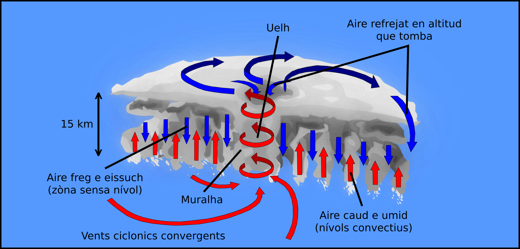 Estructura d'un ciclòn tropicau.